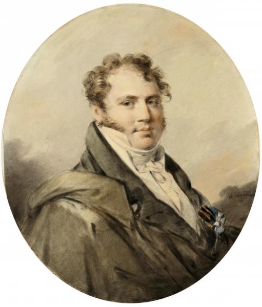 Князь Сергей Сергеевич Голицын (1783 – 1833)